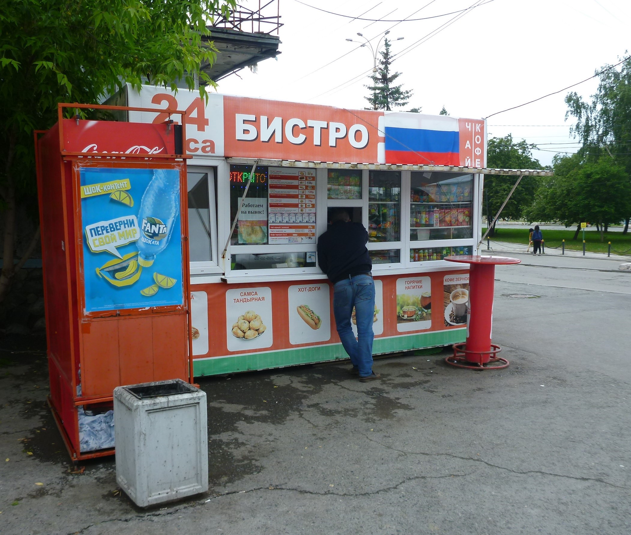 Патриотическое бистро в Екатеринбурге с флагом России 1 июня 2020 года